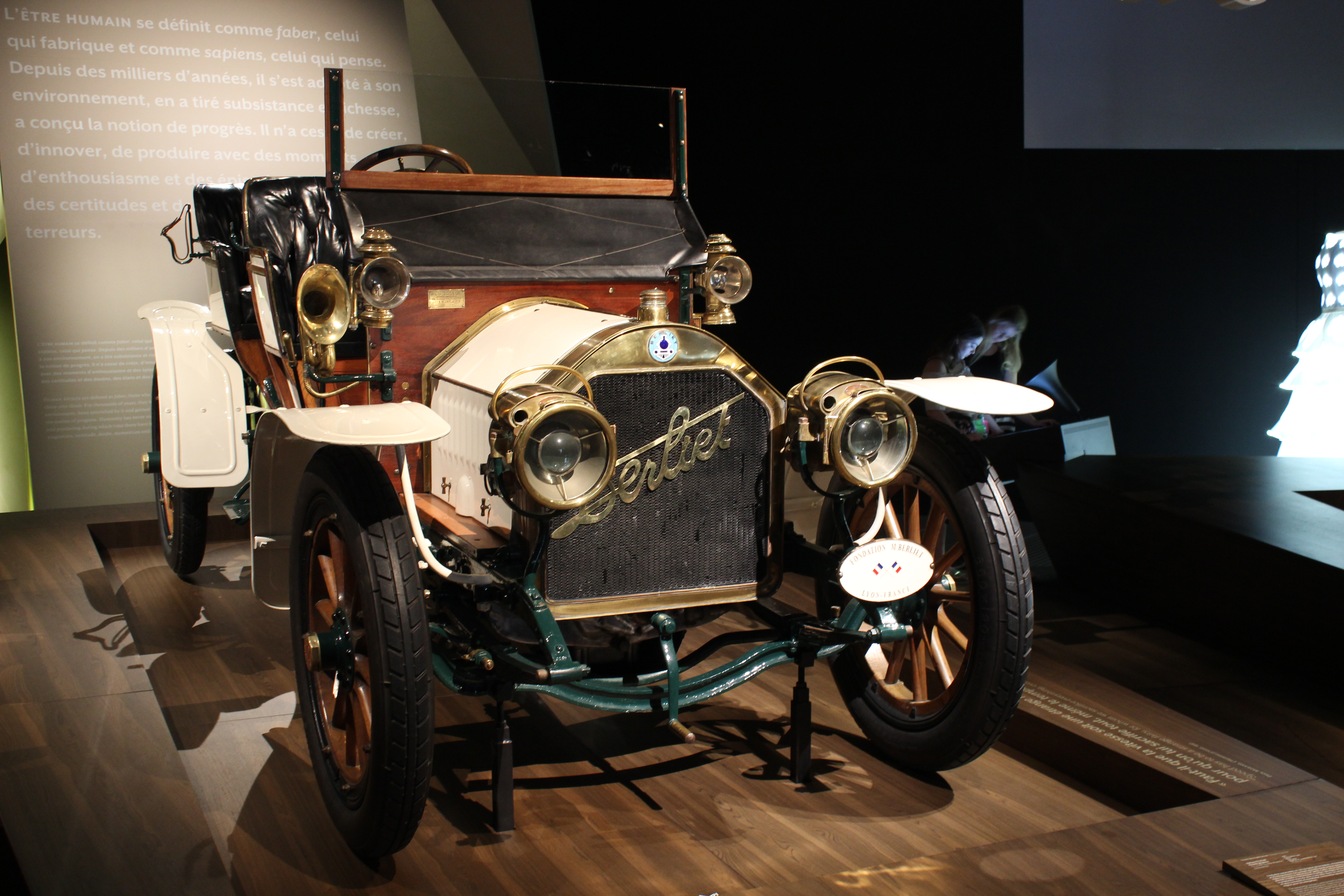 Une voiture Berliet C2 22 HP double phaéton, exposée au Musée des Confluences de Lyon.